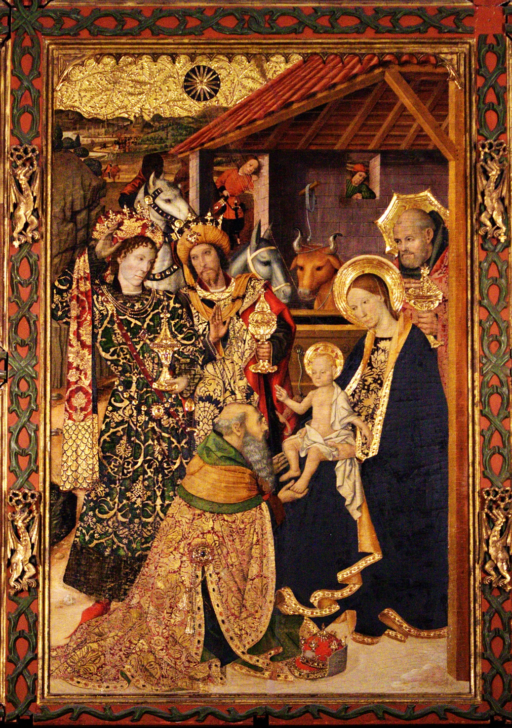 Capella Reial de Santa Àgata (Barcelona). Retaule del Conestable, obra de Jaume Huguet (1464-1465). Tremp sobre taula (673 x 368 cm)